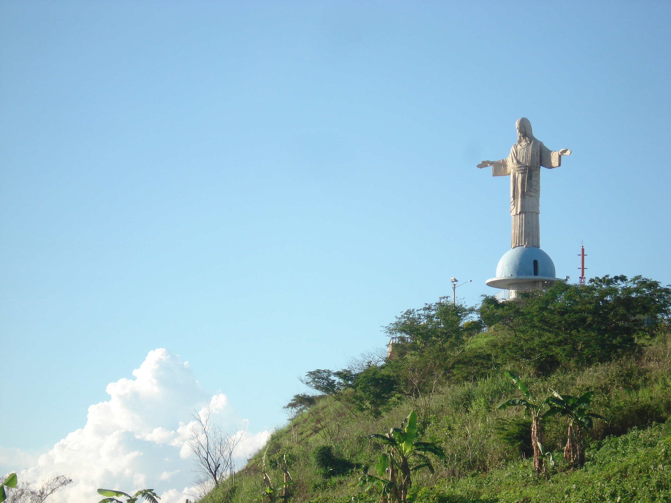 Dimensões:2816.2112 Formato da imagem:JPEG